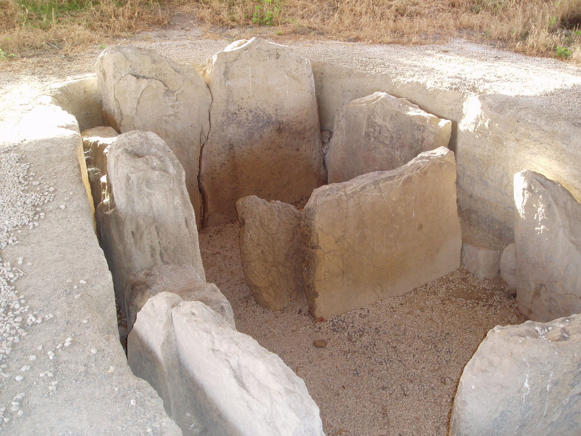 Vista del Dolmen de Alberite, en el término municipal de Villamartín (provincia de Cádiz). Es uno de los más antiguos de la Península Ibérica, pues tiene unos 6.000 años.